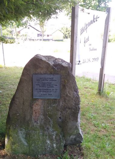 Mittelpunkt Hessens aus dem Jahre 1983; ermittelt durch den Hessenschen Rundfunk. Der ermesse Mittelpunkt aus dem Jahre 2010 ist nicht gekennzeichnet, aber auch in Mücke ca. 800m südlich auf einem Kartoffelacker.